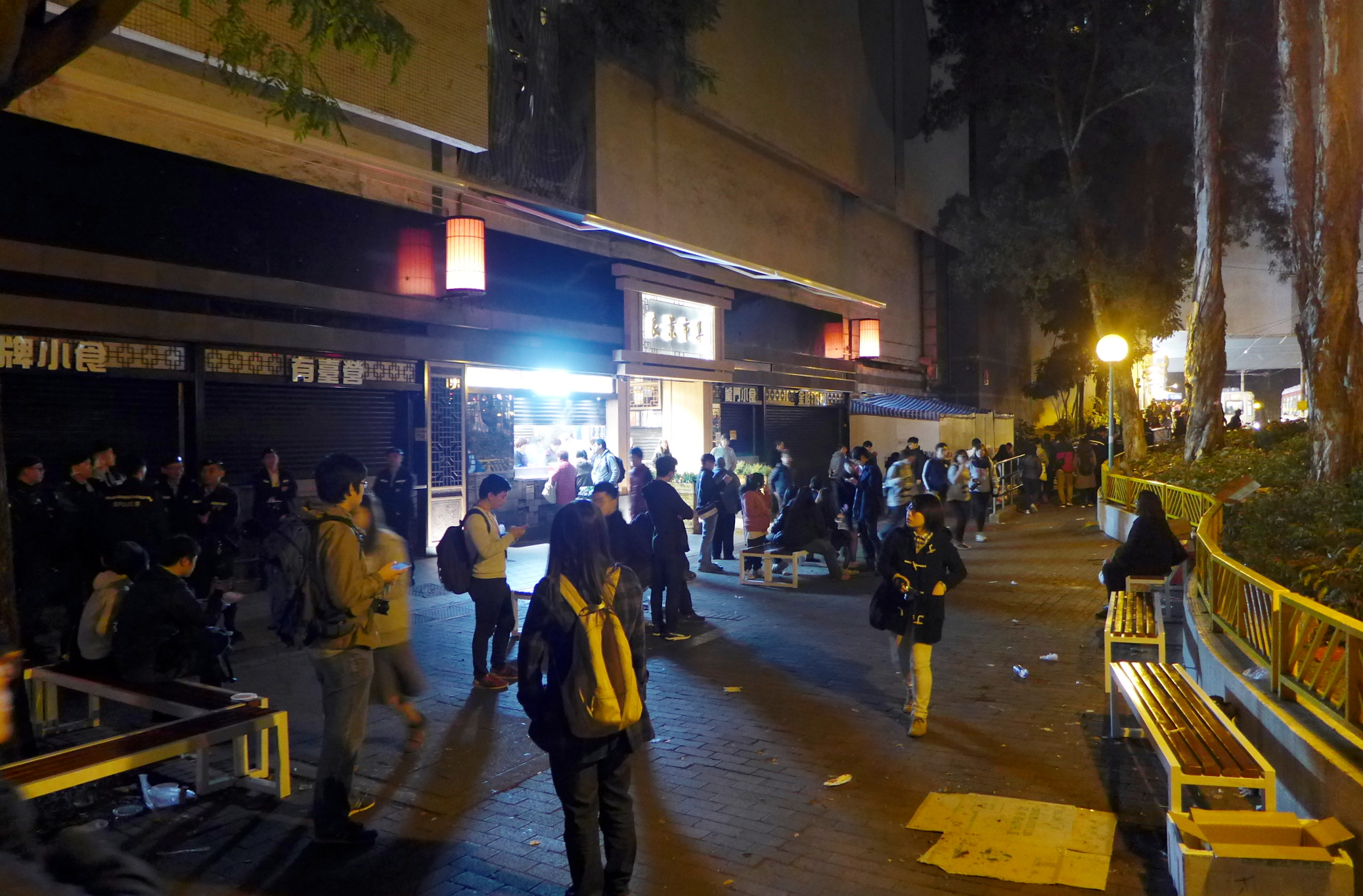 Leung King Estate Hawkers disappear